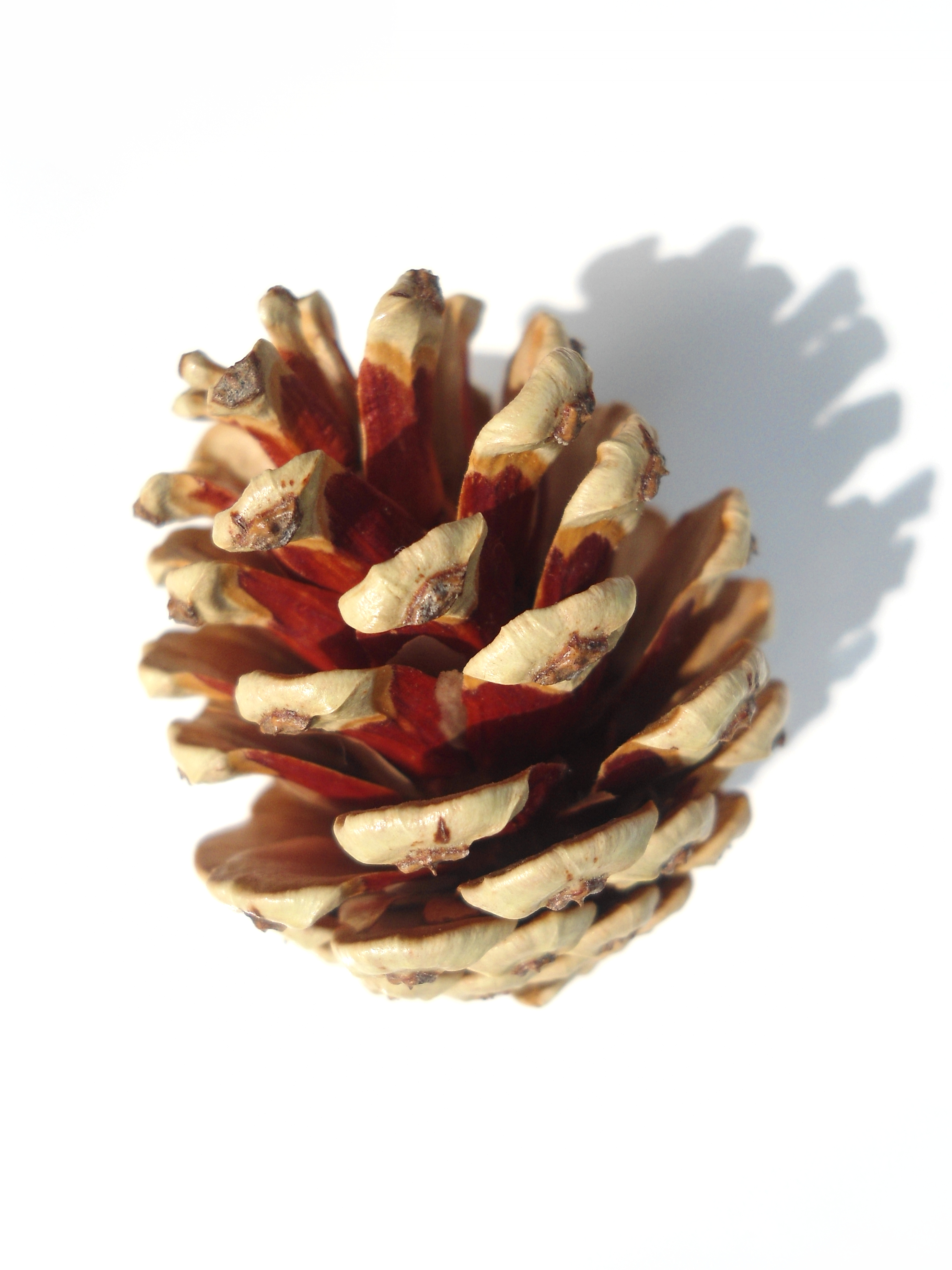 Шишарка на черен бор.